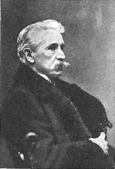 Sr. D. Juan Facundo Riaño, obra del fotógrafo Christian Franzen.